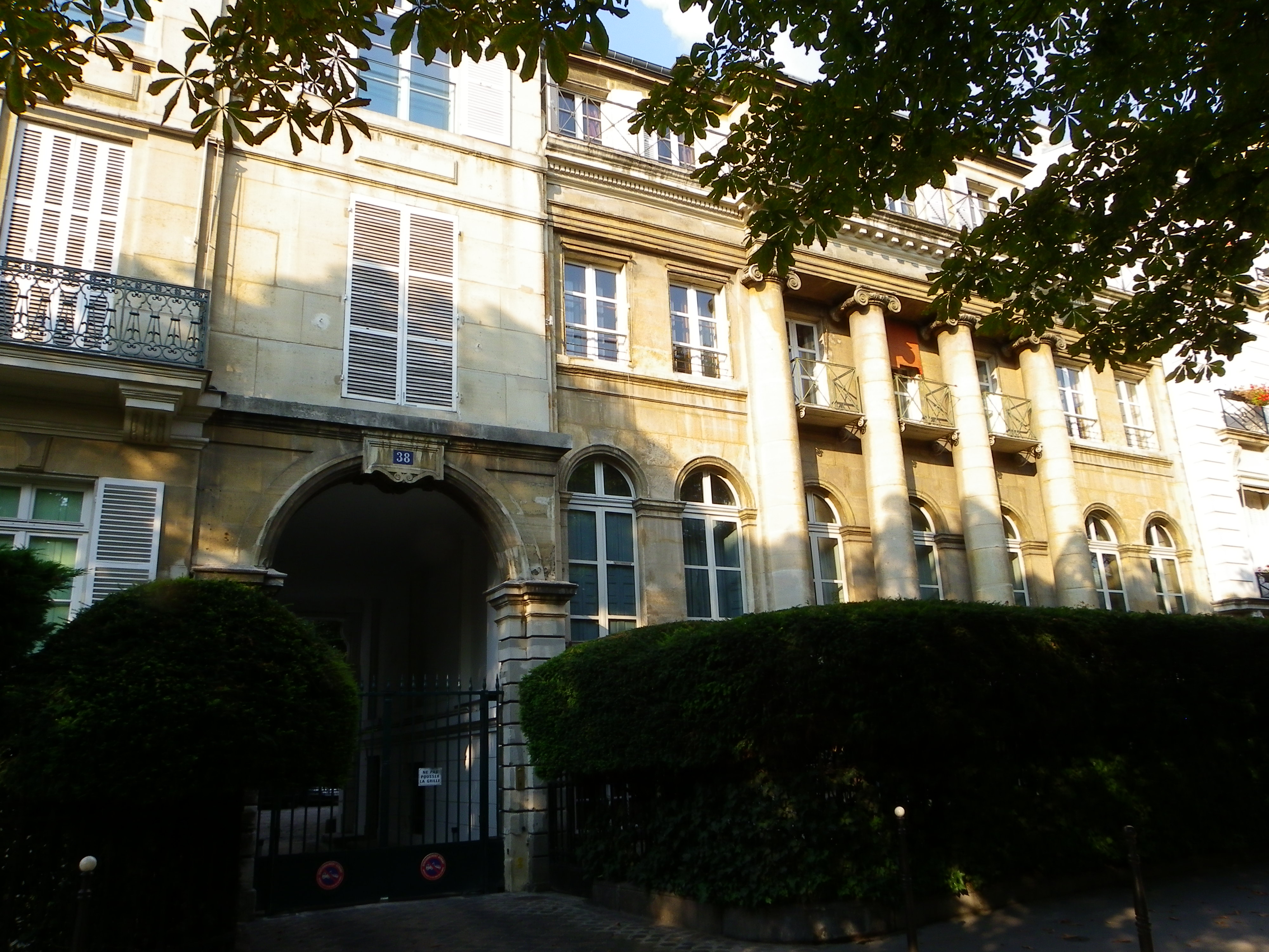 Hôtel des Colonnes au 38 avenue Gabriel à Paris